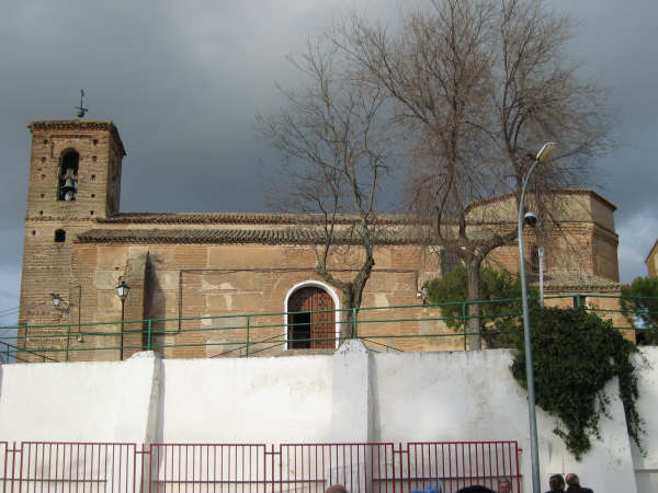 Vista desde abajo